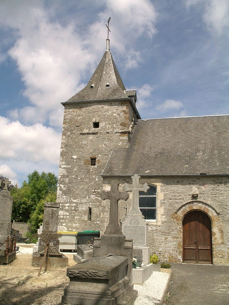 église de Roucamps (Calvados, France)